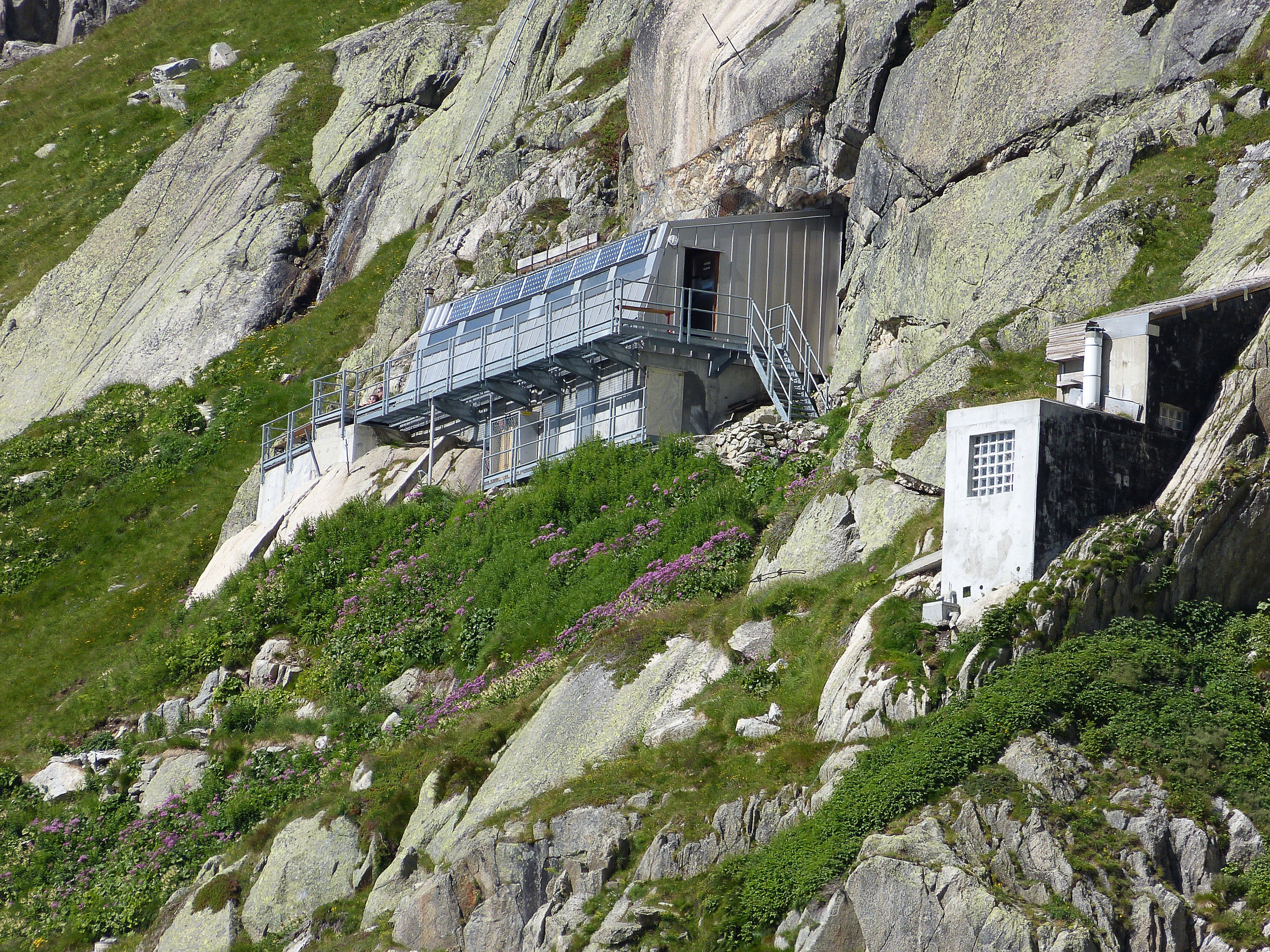 Le refuge de Leschaux